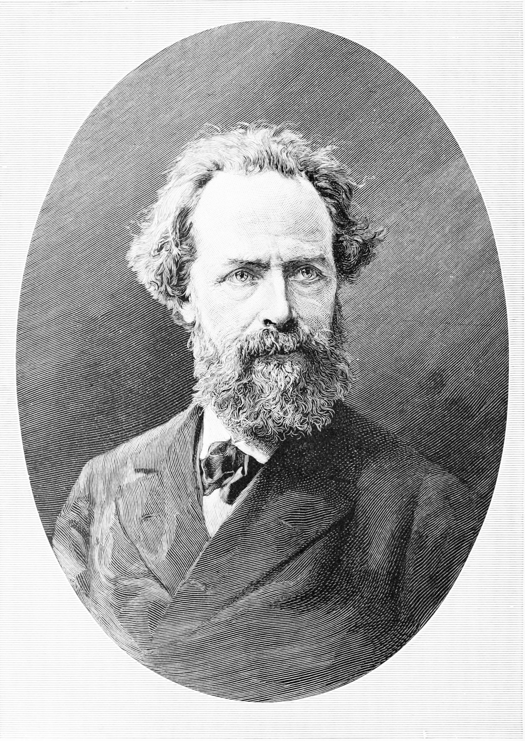 Jacques Elisée Reclus